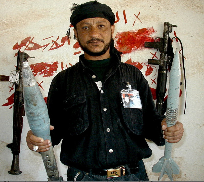 milicien dans le cimetıere de Nadjaf